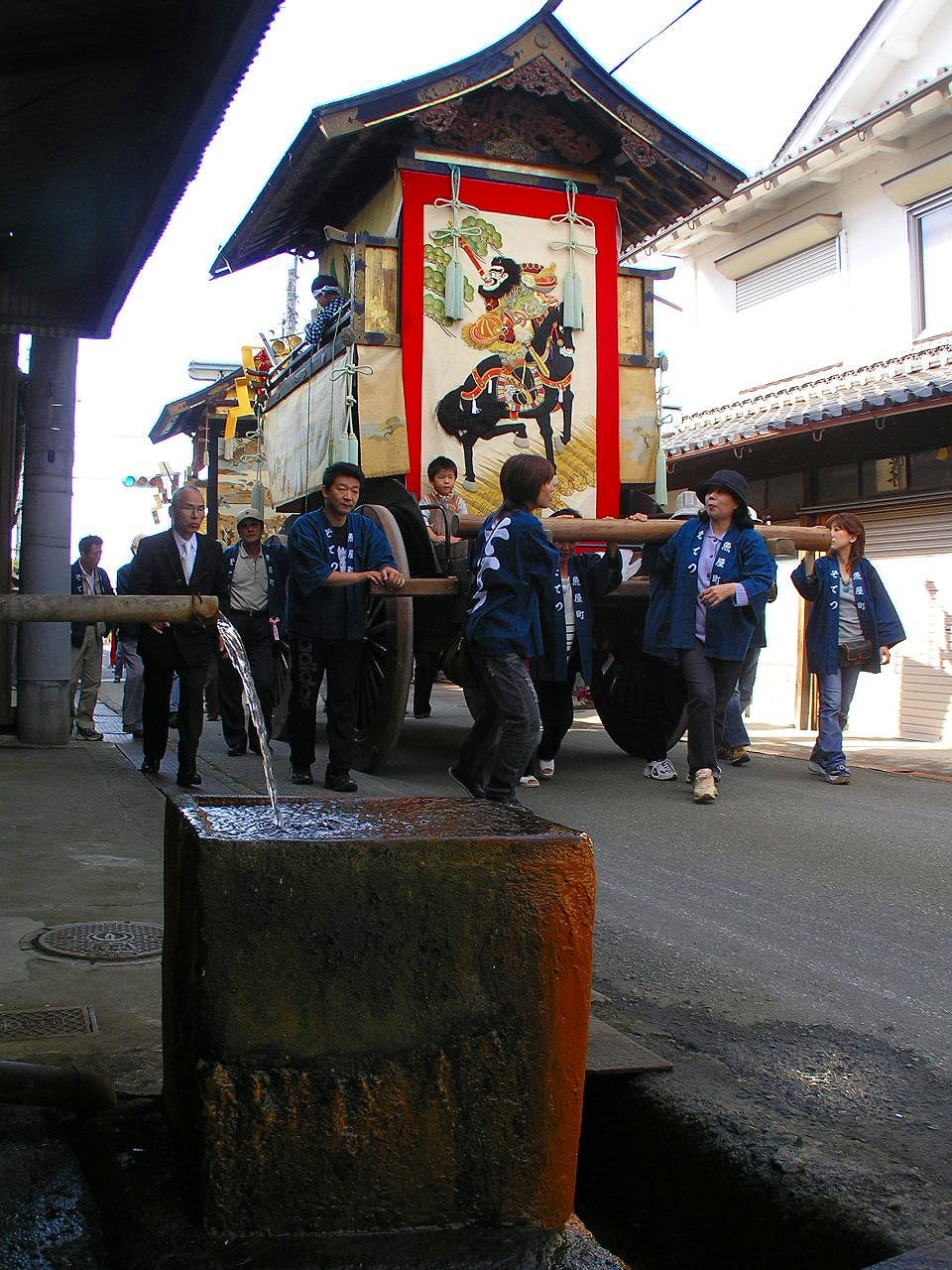 春日神社（かすがじんじゃ）は、篠山市黒岡75にある神社。奈良の春日大社から分霊された。 目次 [非表示] 1 概要 2 歴史 3 社殿 4 文化財 5 年間行事 6 交通アクセス 7 関連項目 8 外部リンク [編集] 概要 奈良の春日大社の分祠を祭り、地元では「おかすがさん」と呼ばれる氏神。能楽殿で演じられる春の春日能と秋の祭礼（10月第3土・日）の京都八坂の祇園祭を模したといわれる4基の神輿、華麗な飾り付けを施された9基の山鉾巡行は京文化を強くうかがわせ、笛や鐘の囃子を響かせながら小京都雰囲気の残るの古い町並みを練り歩く様子は、近代的な町で行われる本場の京都の祇園祭よりも情緒あるものとして知られる。 [編集] 歴史 平安時代初期の876年（貞観18年）当時、日置荘を領有者であった藤原基経、藤原時平父子により藤原氏の氏神である春日大社（奈良県）より分詞し黒岡村南部の当時は笹山と呼ばれた現在は篠山城のある小山に勧請し、祀り氏神としたのが起源とされる。後の1609年（慶長14年）、篠山城築城の際に現在の地に遷された。 秋の祭礼に使われる4柱の神霊を移した金神興は、2基を黒岡村より元禄7年6月に、他の2基は安永8年9月（元禄13年の説もある）篠山町より寄進されたもの。9台のちんちき山と呼ばれる山鉾は寛文3年以降に各町内より寄進されたもので、京都の祇園の山鉾を模し造られており、絢爛豪華である。明治後期までは鳳凰・孔雀・蘇鉄・猩猩等の鉾をつけ巡行したが、電線が障害となり現在は鉾を付けずに巡行される。また太鼓御興は、交化交政に、王地山焼の陶工たちが担ぎ始めたのが始まりと伝えられる。 鉾山 長さ6m、高さ約5m、屋根までの高さは京都祇園祭・山鉾の約三分の二ほどの規模ながら京都の祇園祭に強い影響を受けている。初期の鉾山は現在よりも小形で簡素なものだったが、江戸時代中期頃に現在の規模となり華麗さを増した。初めて鉾山が作られたのは1663年（寛文3年）の三笠山 （上河原町）と伝えられる。篠山市指定文化財。 上町4台 三笠山（上河原町）、鳳凰山（下河原町）、孔雀山（上立町）、高砂山（下立町） 下町5台 剣鉾山（呉服町）、猩々山（上二階町）、諫鼓山（下二階町）、蘇鉄山（魚屋町）、鏡山（西町） 神輿 1694年（元禄７年）および1779年（安永8年）に寄進奉納されたが、4基あるのは春日神社の4祭神にちなんだもので、4祭神とは天児屋根命（あまのこやねのみこと）、武甕槌命（たけみかつちのみこと）と経津主命（ふつぬしのみこと）比売神（ひめのおおかみ）である。 [編集] 社殿 本殿 能楽殿 篠山藩主13代藩主青山忠良によって江戸時代末期である1861年（文久元年）に建てられた能舞台。建築は稲山嘉七、永井理兵衛、舞台背景に描かれた松の絵は松岡曾右衛門によるもので、当時箱根以西において最も立派なものであると称えられた。正月の1月1日には、翁奉納および毎年、桜の咲く時期の4月上旬に「篠山春日能」が催される。2003年（平成15年）には国の重要文化財に指定される。 絵馬堂 1952年（昭和27年）8月に平和記念に建立された。内部の馬絵は、当初は旧拝殿内に会ったものだが慶安2年に松平忠国が奉納した狩野尚信作の黒神馬は、精緻なもので価値が高い。この絵馬だけには金網が張ってあったが、それはこの馬が夜な夜な絵から抜け出しては黒岡の田畑の豆を食い荒らしたという伝説があるためである。多紀名宝にも指定されている。 [編集] 文化財 重要文化財 能楽殿 [編集] 年間行事 1月1日 翁奉納。午前0時過ぎより行われる。 4月上旬 春日能。 10月第3土・日 秋の祭礼。 [編集] 交通アクセス 鉄道:JR福知山線「篠山口駅」 バス:神姫バス「春日神社前」より徒歩すぐ。 [編集] 関連項目 天児屋根命 武甕槌命 経津主命 比売神 春日神 [編集] 外部リンク 丹波篠山観光協会 公式サイト 春日神社地図 2007年第34回春日能（兵庫県篠山市教育委員会地域文化課 ） " より作成 カテゴリ: 兵庫県の神社 | 春日神社 | 篠山市